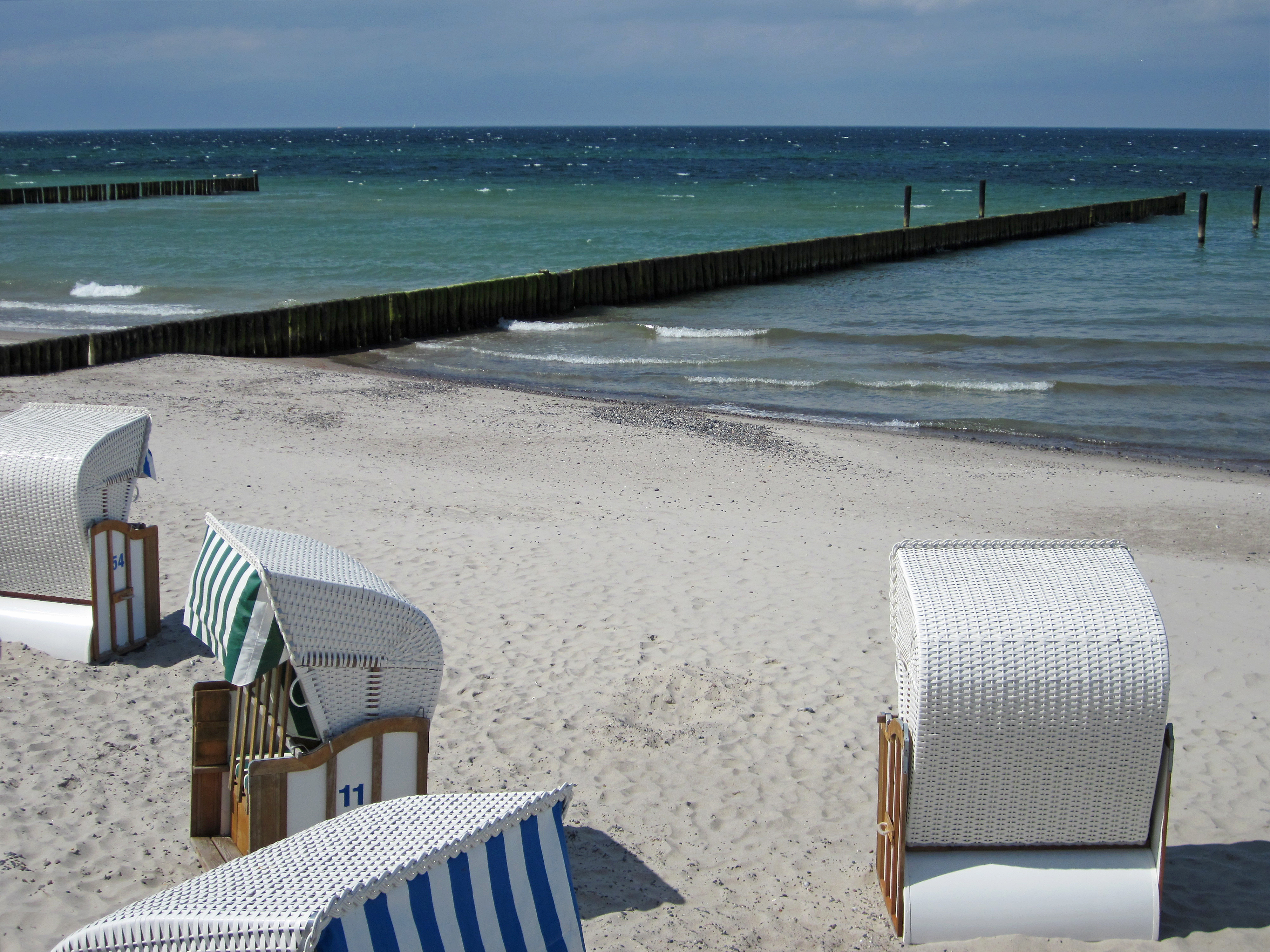 Strand in Nienhagen